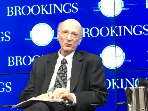 史汀生中心東亞項目主任容安瀾。